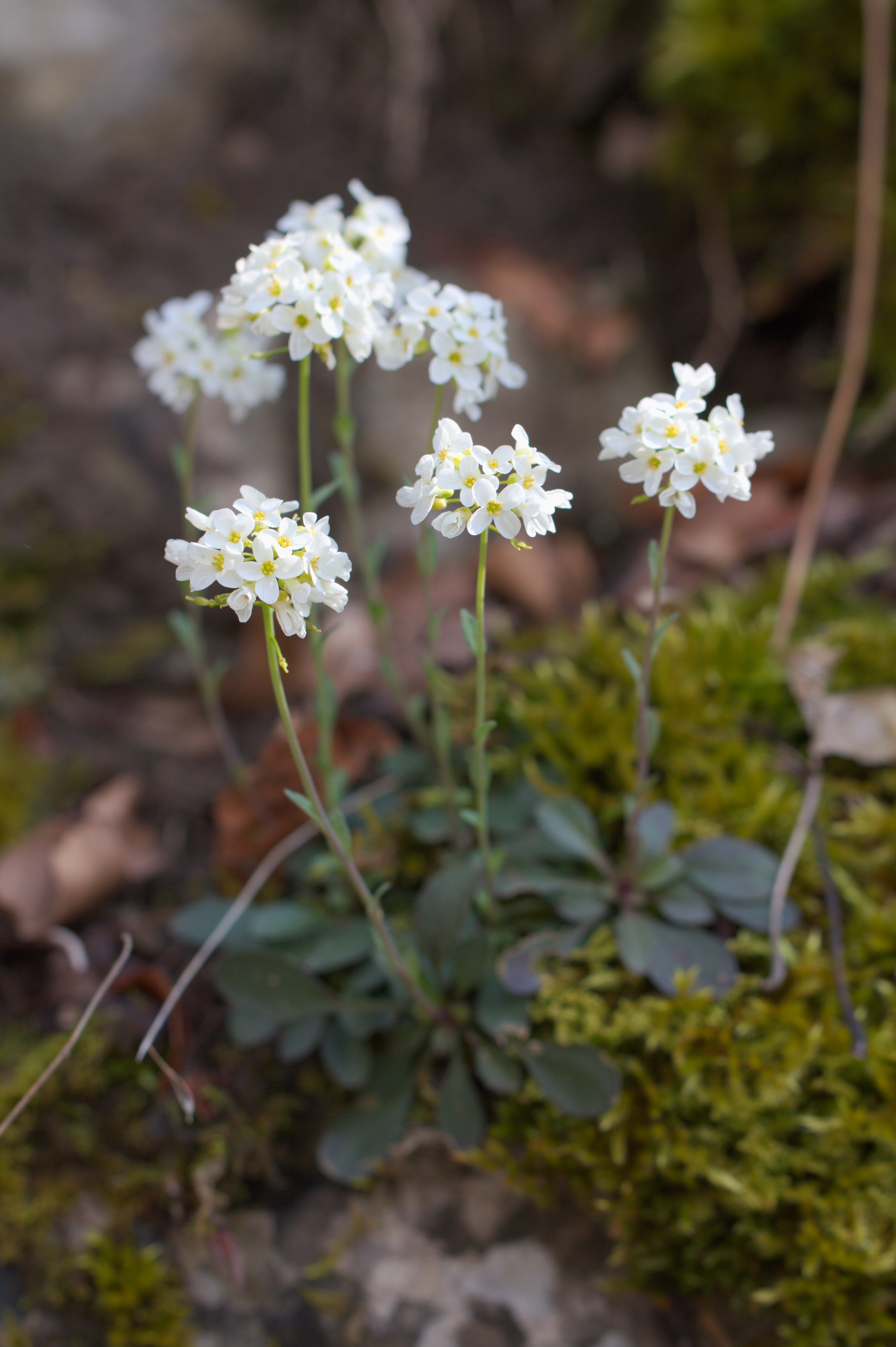 NPR Karlštejn - jarní aspekt Penízek horský, Thlaspi montanum Status ohrožení: C3